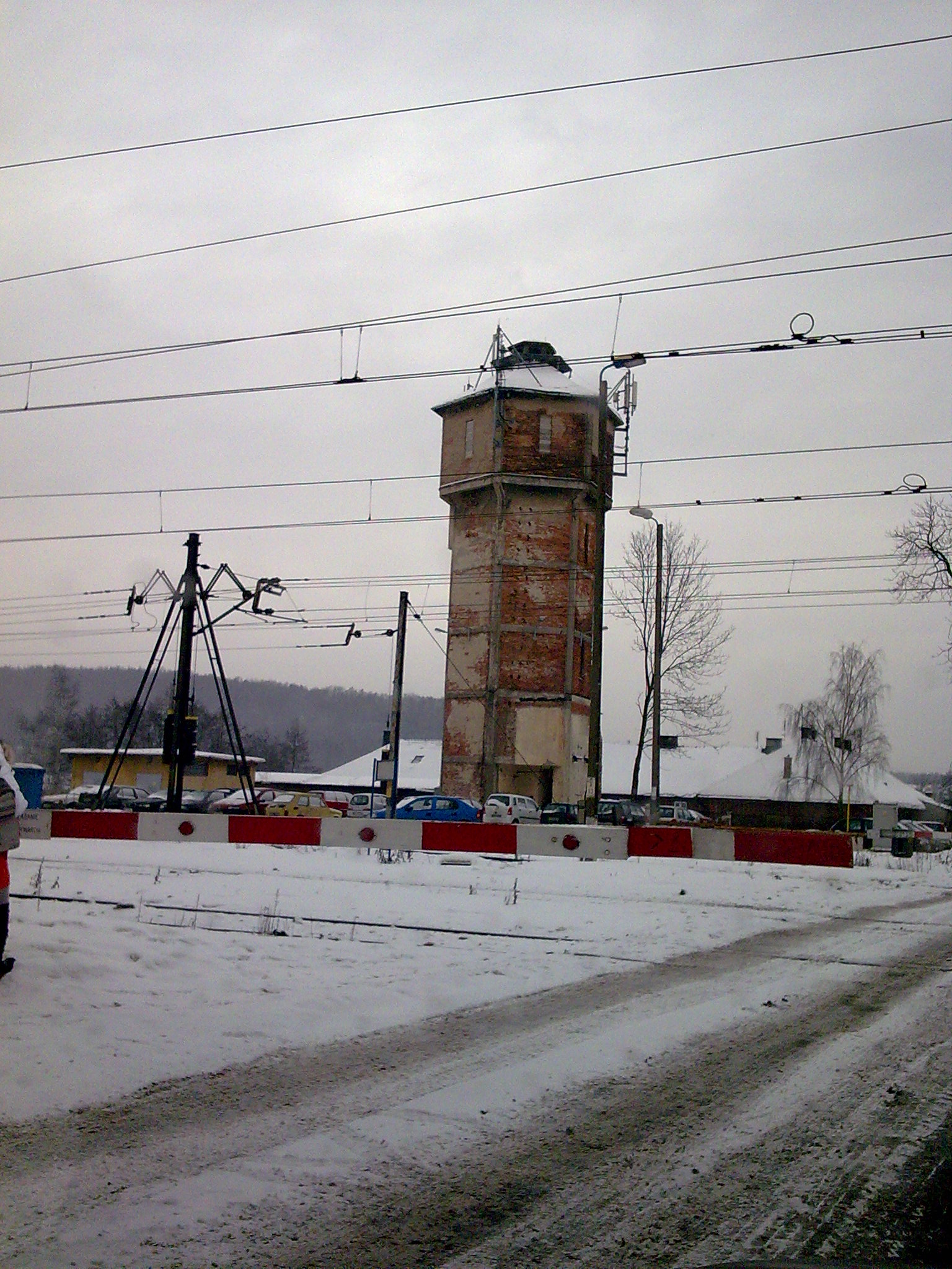 Wieża ciśnień w Krzeszowicach.